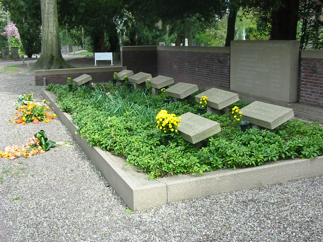 Graven van de bij het Twentol-drama in 1945 omgekomen verzetsmensen op de Algemene Begraafplaats aan de Raalterweg te Deventer.